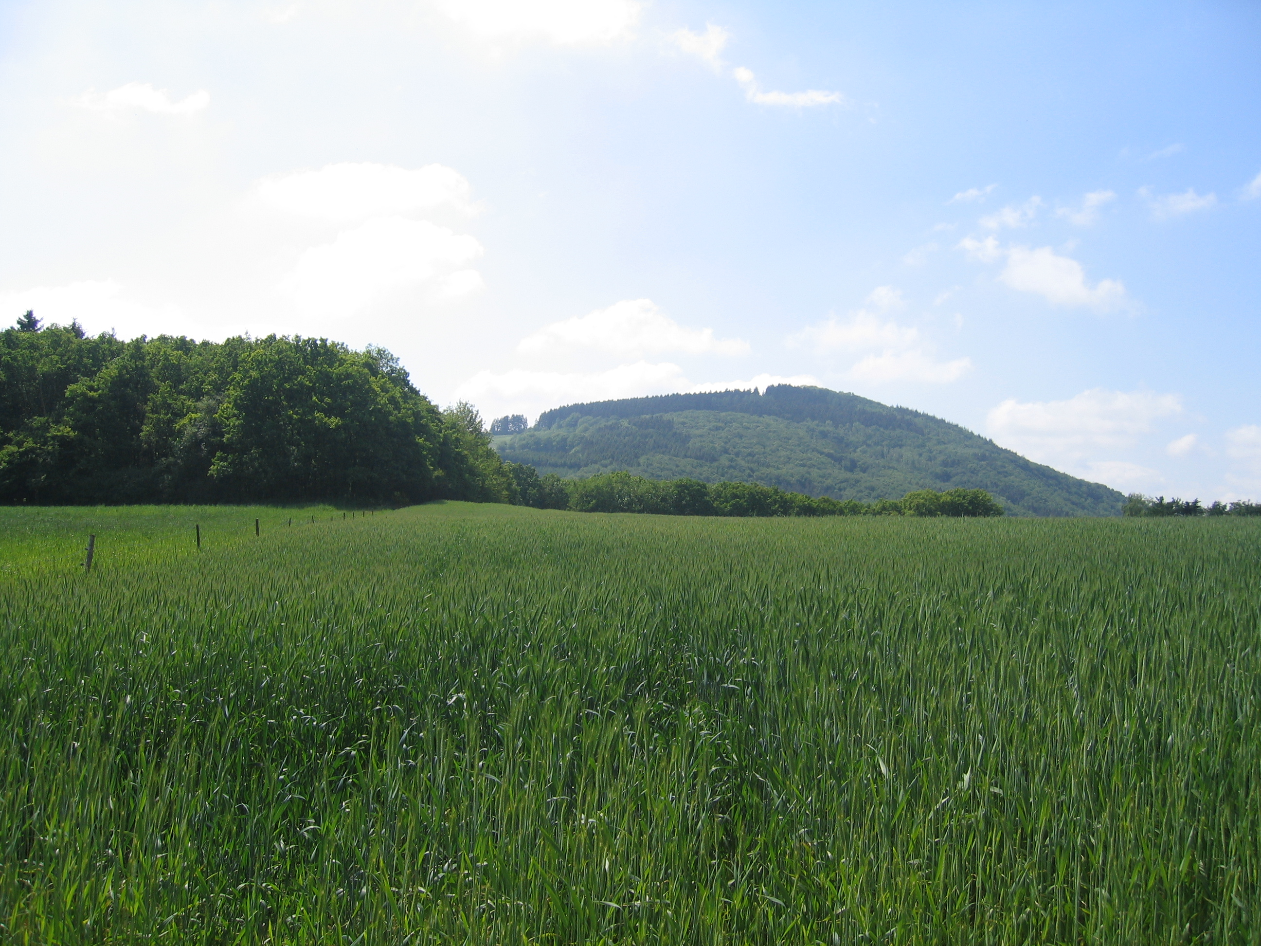 Der Hochthürmerberg